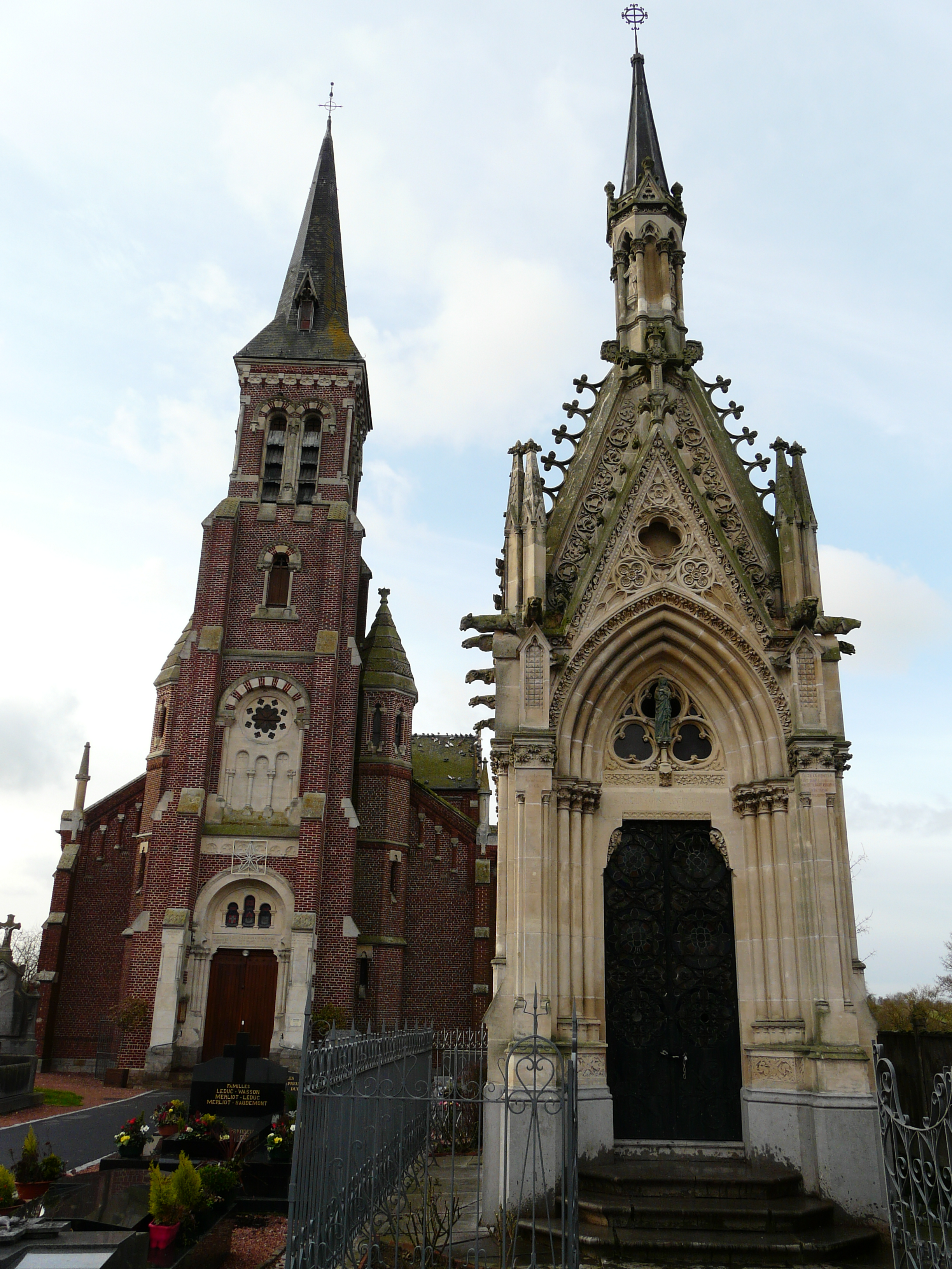 L'église Saint-Vulgan et la chapelle Bricout (architecte André de Baralle) à Estourmel (Nord)